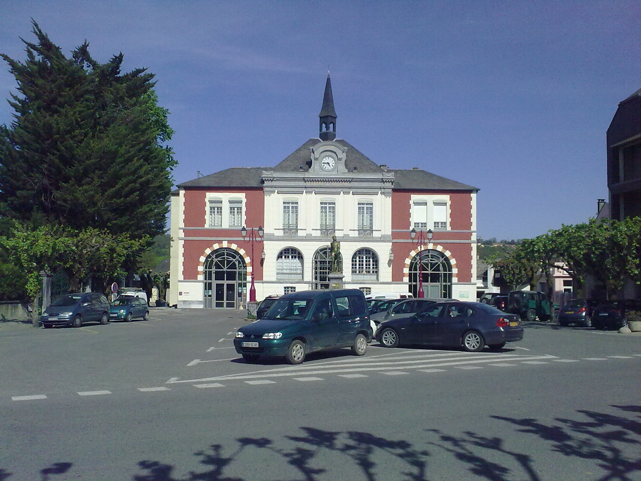 Pontacq, France